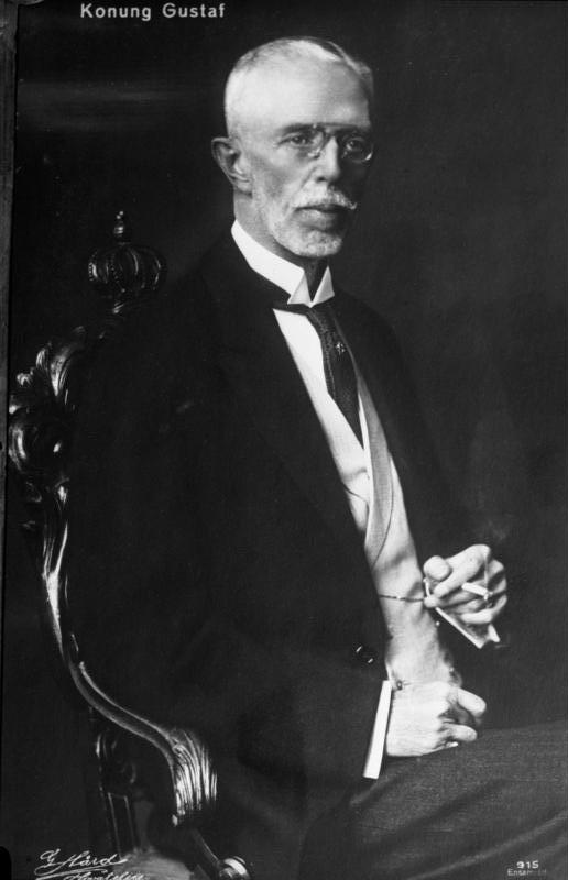 Konung Gustaf